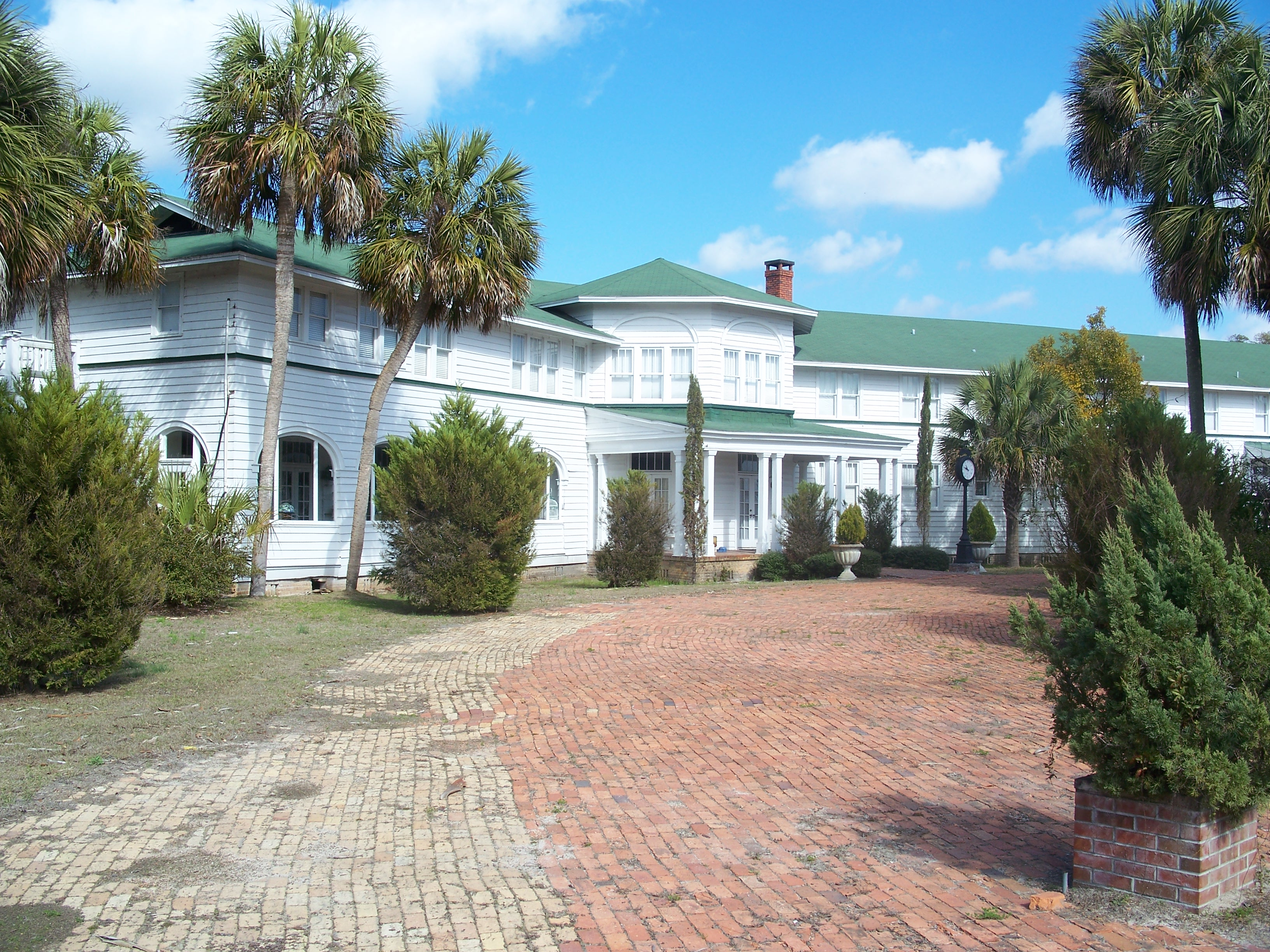 Shamrock, Florida: Putnam Lodge